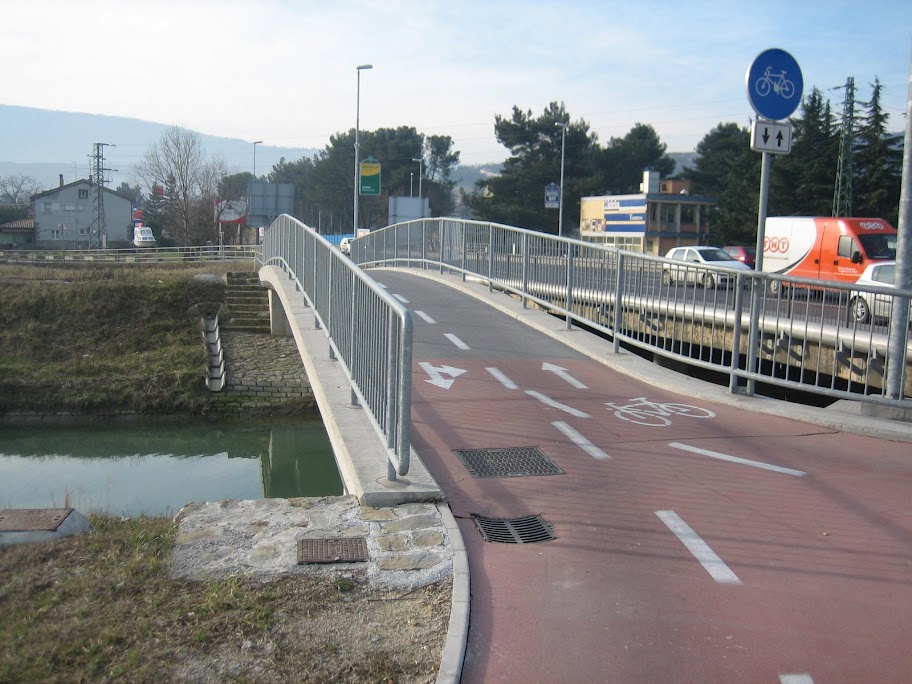 Most čez Badaševico namenjen v trasi kolesarske poti imenovane Parencana